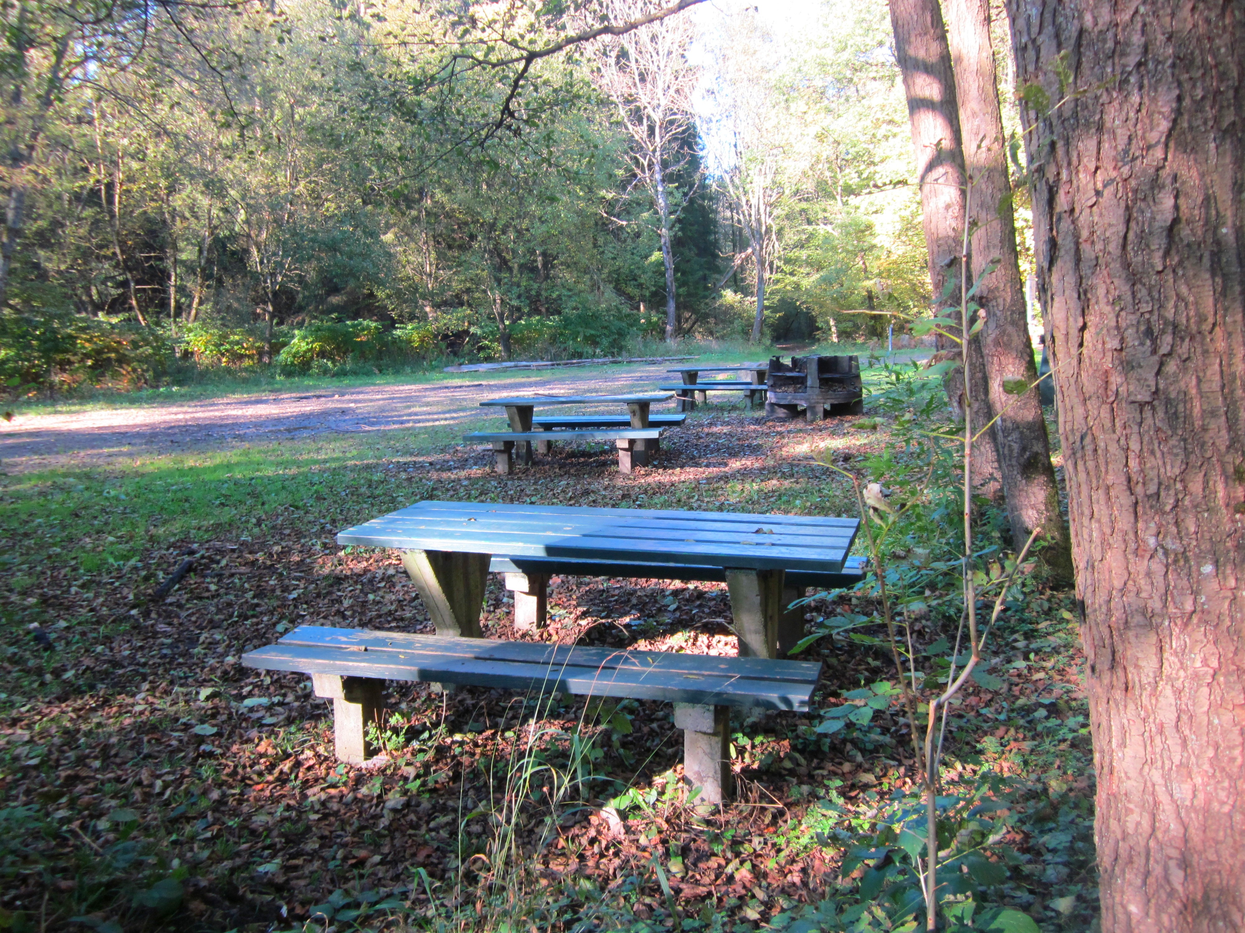 XHORIS